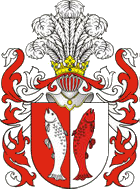 Herb Wadwicz Clan